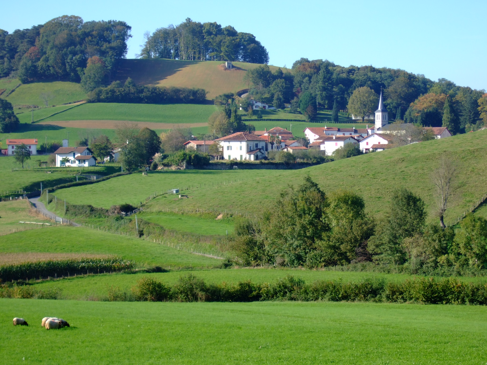 Le village de Lacarre depuis le GR 65